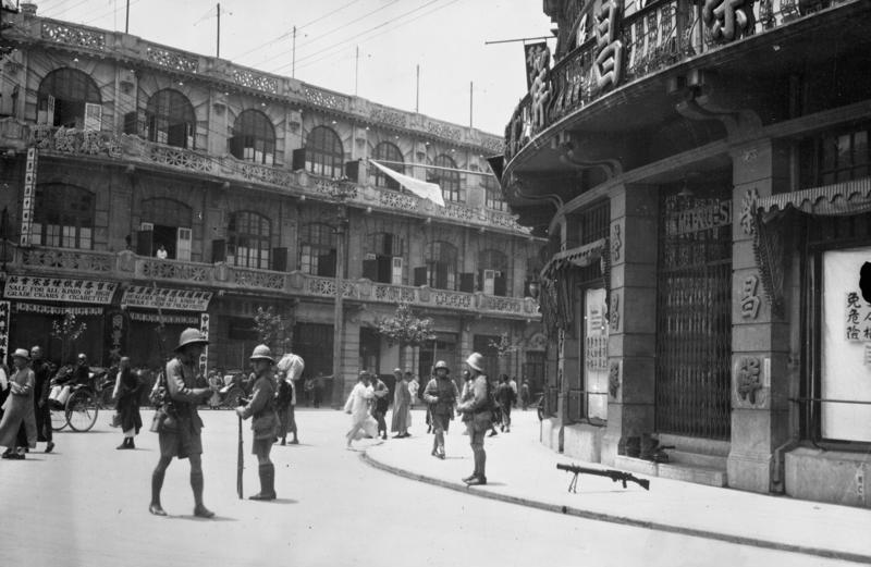 Die Kritische Lage in Changhai ! Englische Maschinengewehrposten an einer Kreuzung in Changhai zur Sicherung der Ruhe und Ordnung.